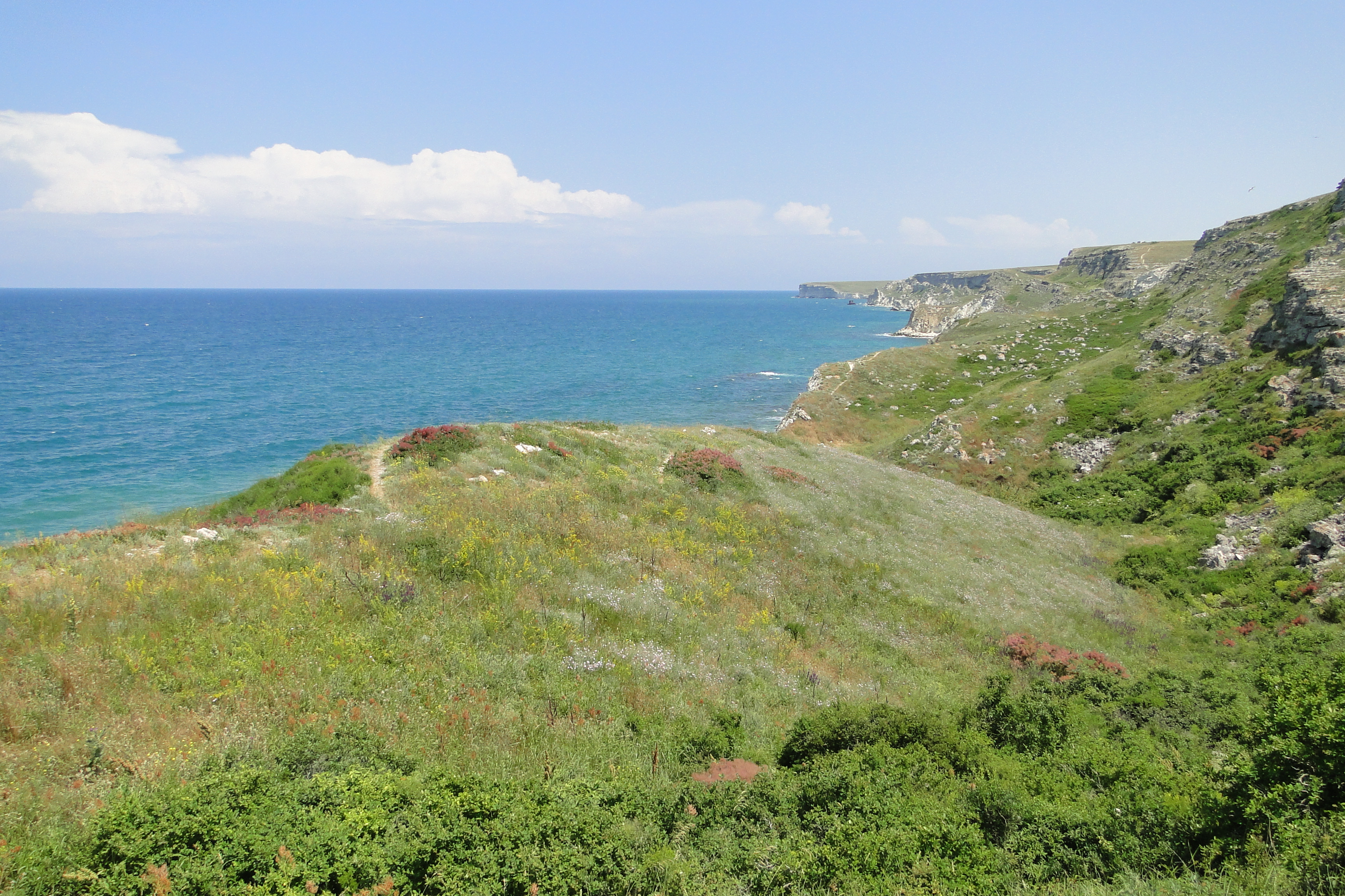 ПАК біля Джангульського зсувного узбережжя, Чорноморський р-н, с. Оленівка